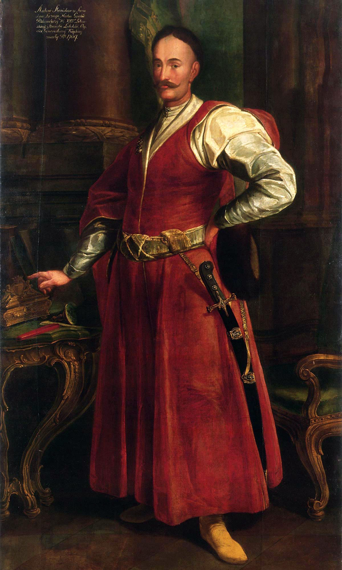 Беларуская (тарашкевіца): Партрэт Станіслава Антонія Шчукі (Stanisłaŭ Antoni Ščuka)